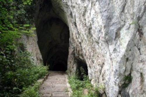 situata in Baile Herculane langa Hotelul Roman, intrarile sunt vizibile din drum, niste scari de beton urca pana la intrare; este fosta Grota Haiducilor; pestera a fost locuita din paleoliticul mijlociu, avand o foarte mare importanta arheologica; fiind foarte intens vizitata, este foarte degradata, peretii sunt acoperiti de iscalituri, unele din acestea foarte vechi, altele facute cu foarte multa migala; paradoxal aceasta colectie de semnaturi, prin valoarea lor istorica au crescut valoarea pesterii; pestera are 143 m, iar cea mai veche semnatura este datata 1820.